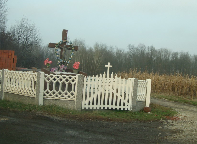 Goli Vrh - Raspelo